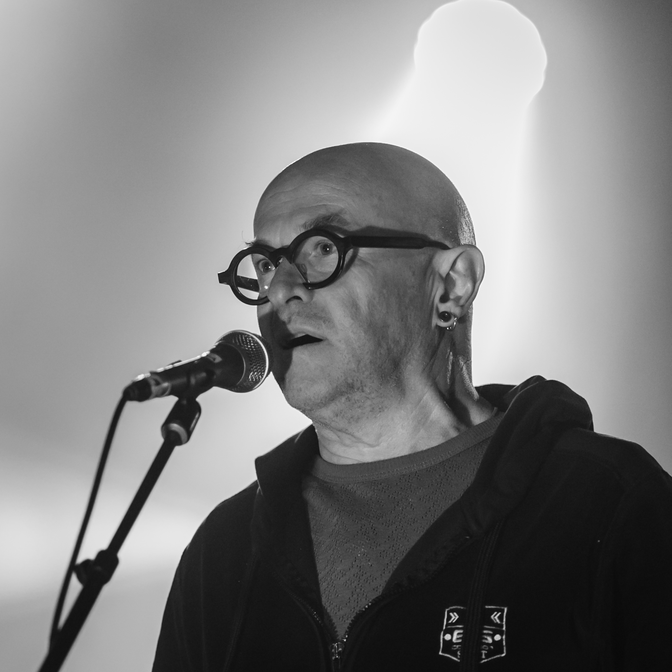 Yann-Fañch Kemener avec le groupe Ossian en fest-noz au festival de Cornouaille à Quimper le 20 juillet 2017.